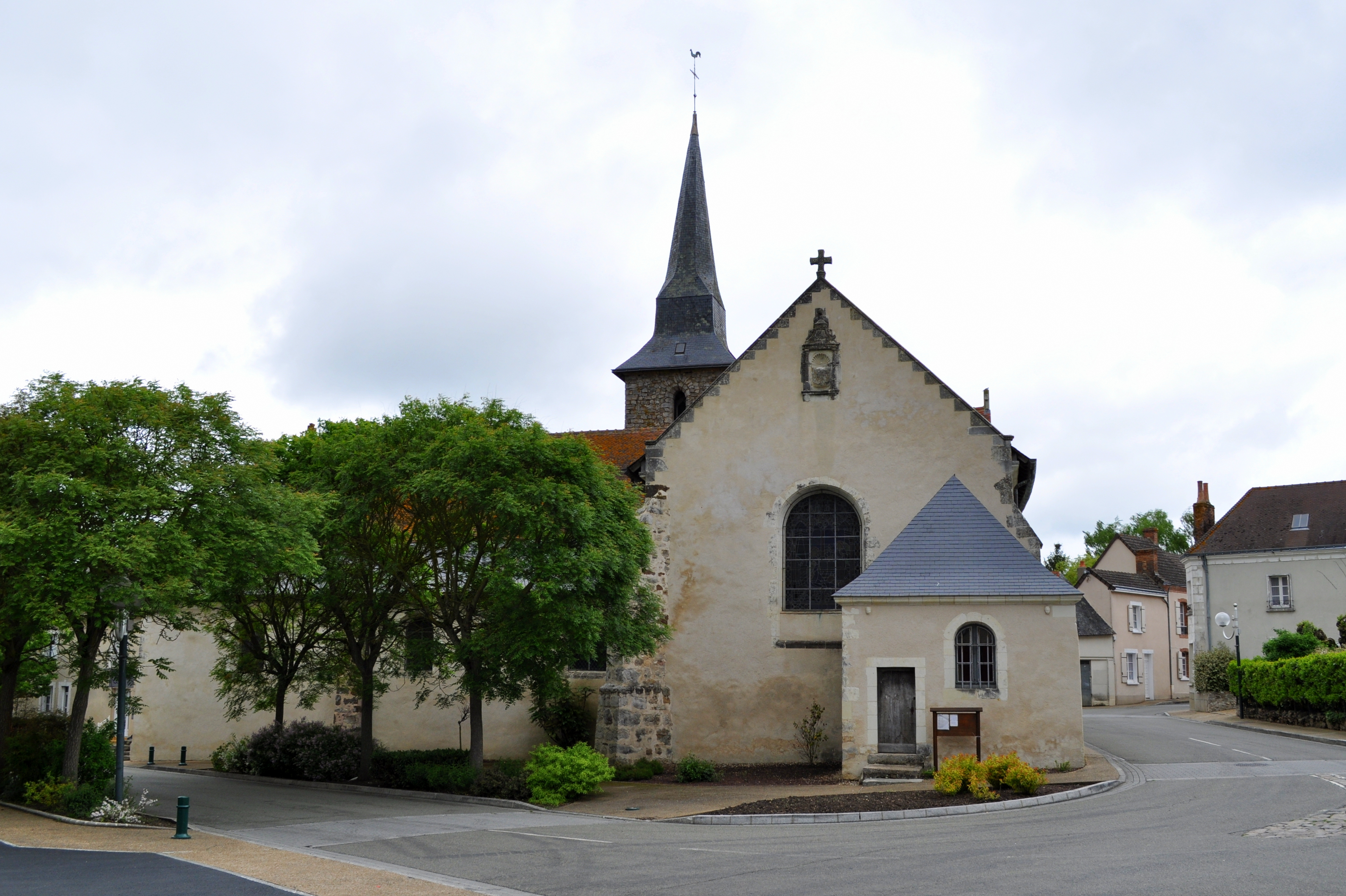 Eglise de Requeil (Sarthe)